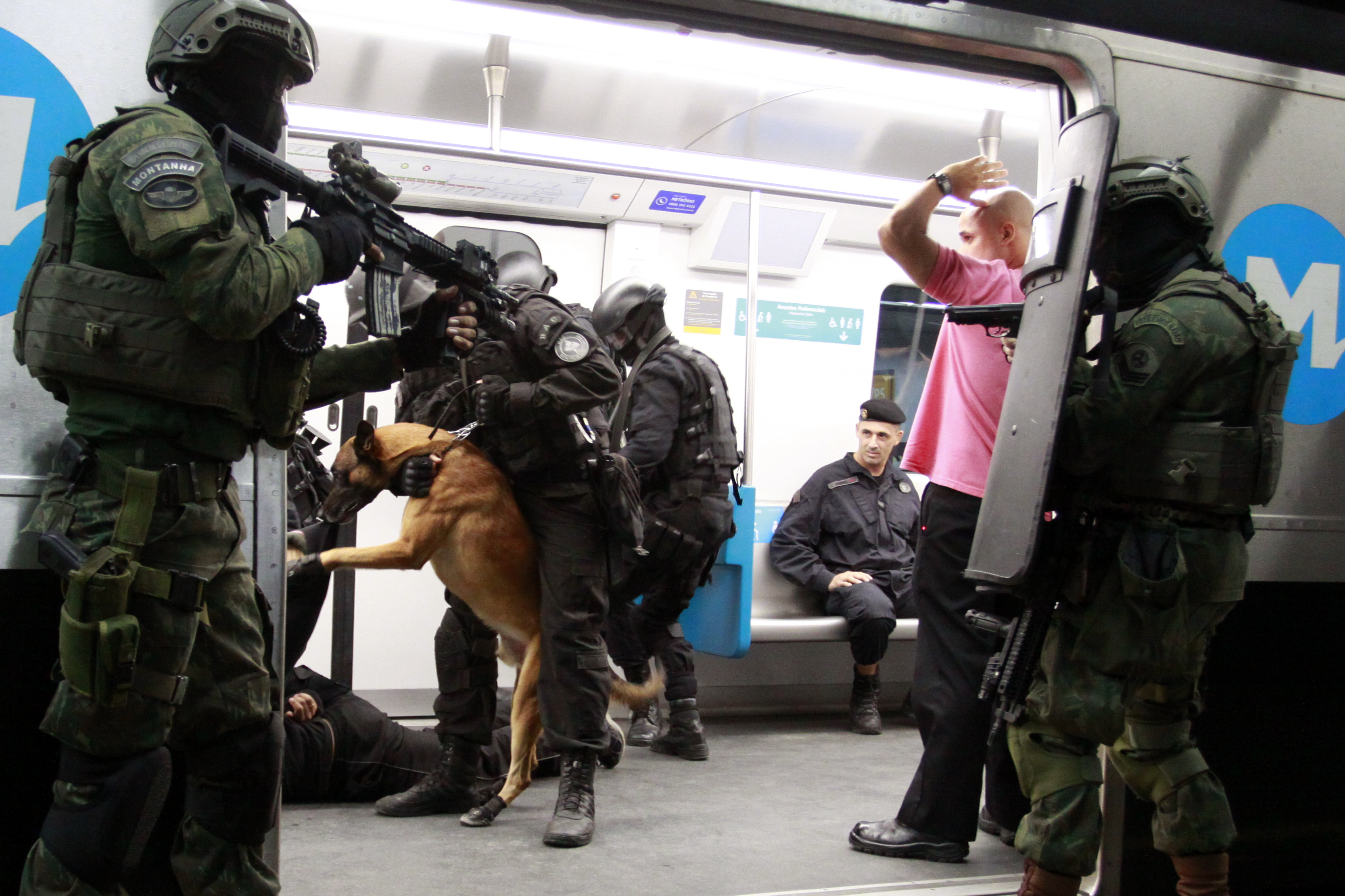 MetrôRio e COE realizam simulação de situações de risco.